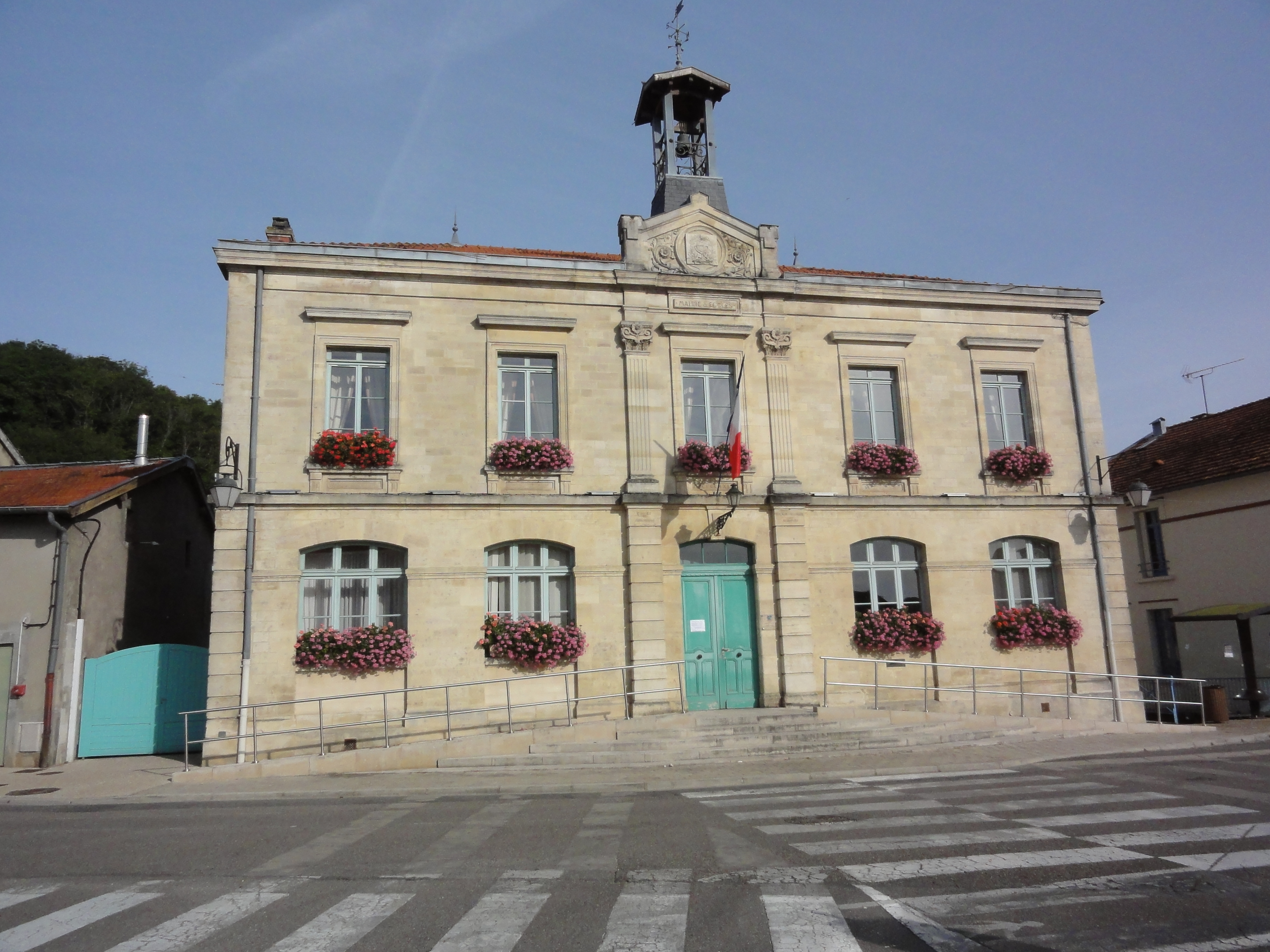 Fains-Véel (Meuse) Fains-les-Sources mairie